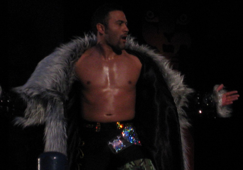 ロッキー・ロメロ（新日本プロレス、大阪大会2月12日）